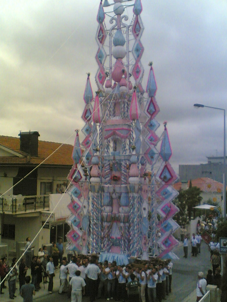 O Andor Grande, nas Festas da Aparecida, Lousada, Portugal, em 14 de Agosto de 2007. Este é o maior andor de Portugal e candidato a maior do mundo no Guinness Book.